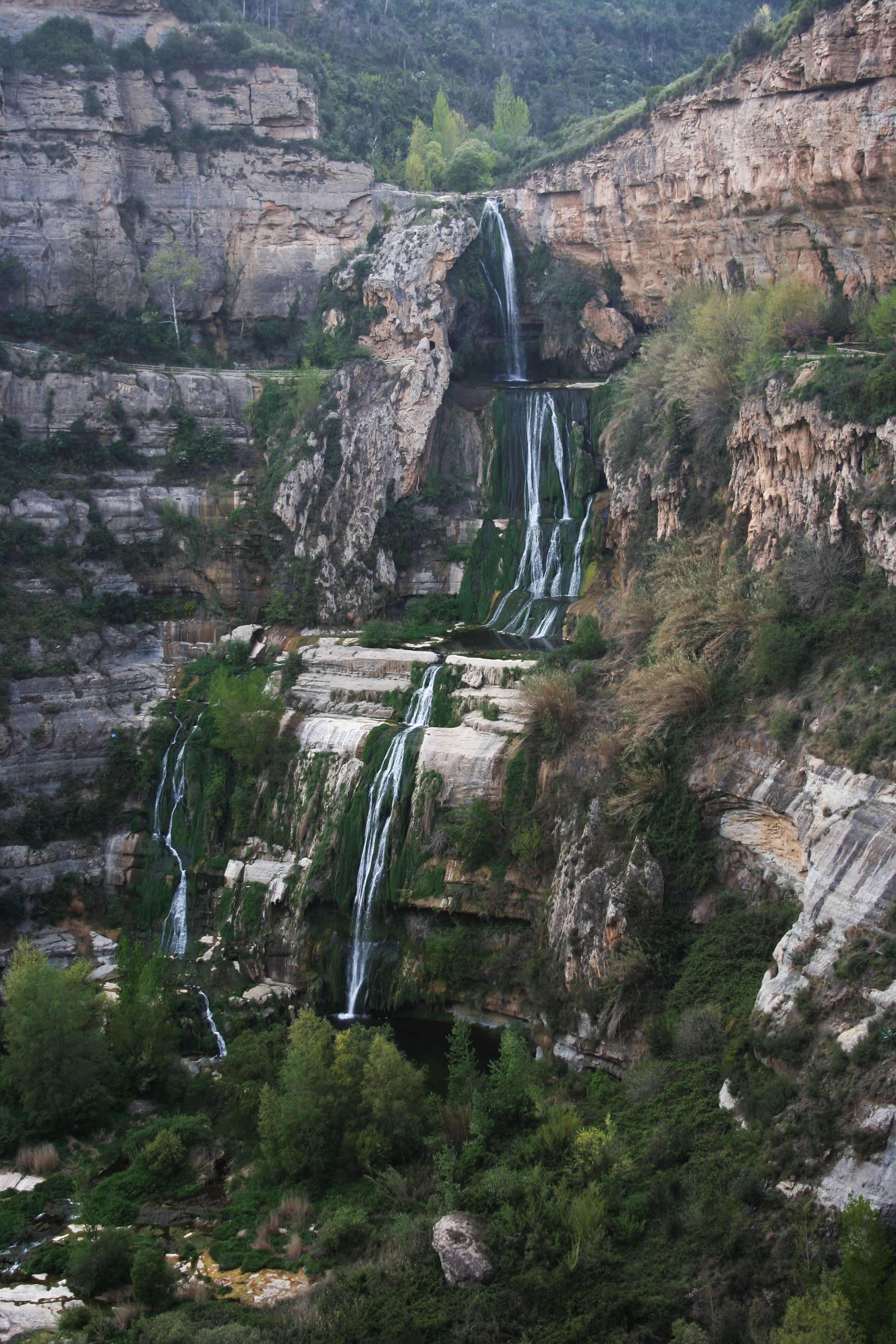 Cascada del río Tenes en Sant Miquel del Fai